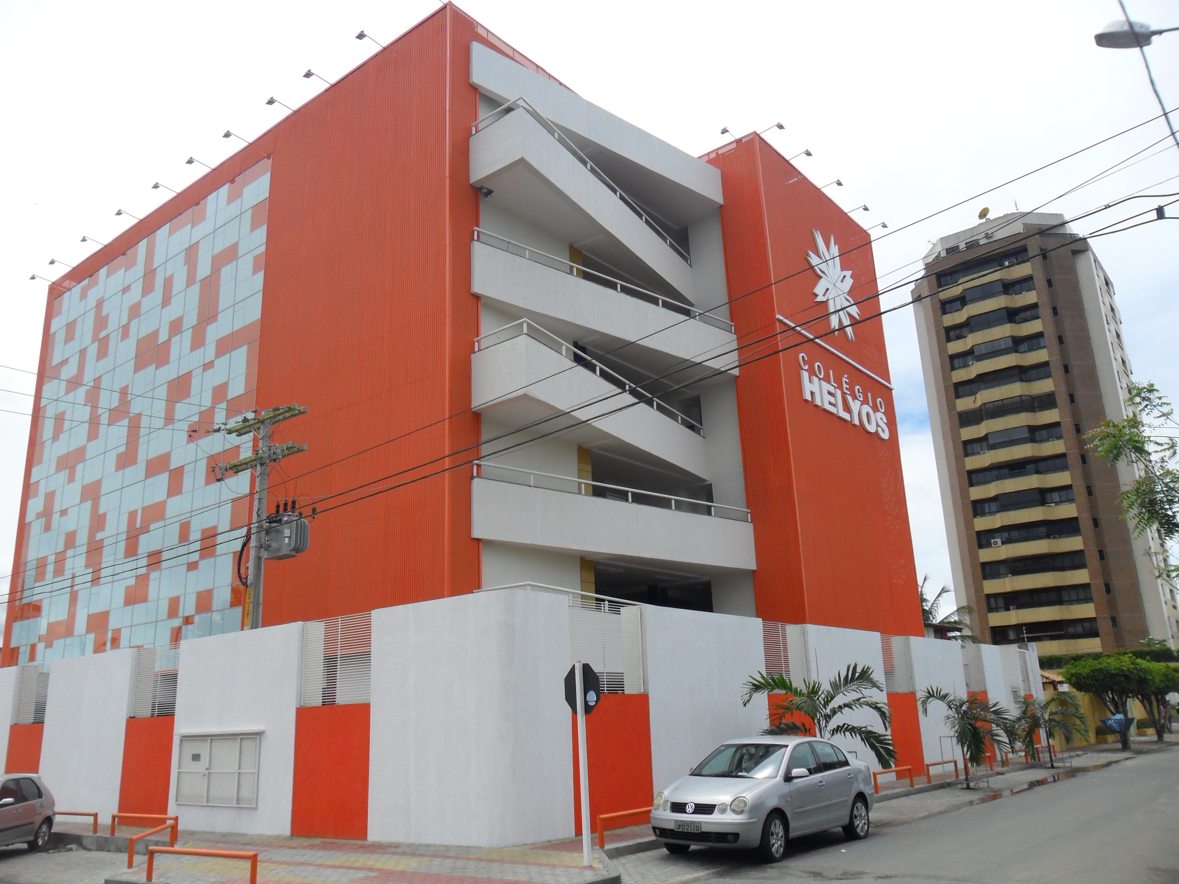 Colégio Helyos Feira de Santana